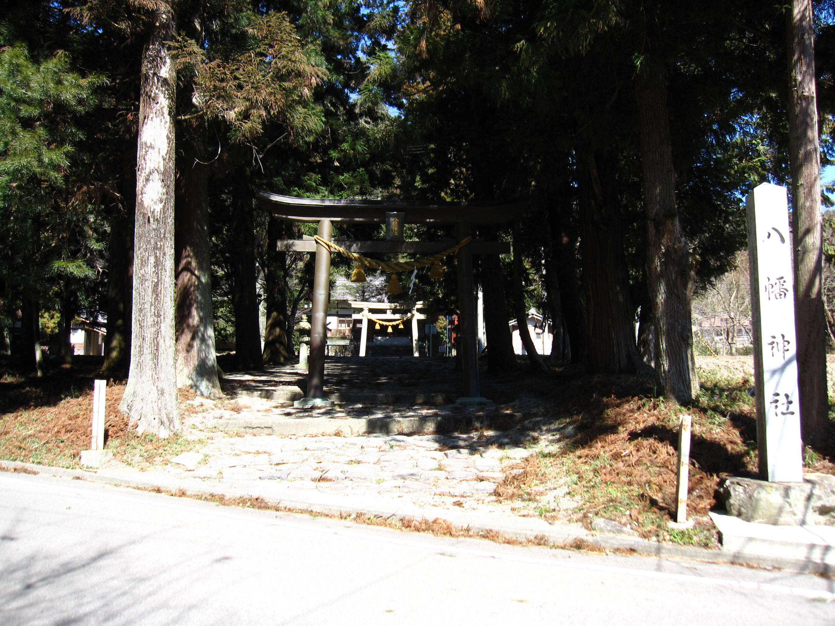 下原八幡神社境内入口